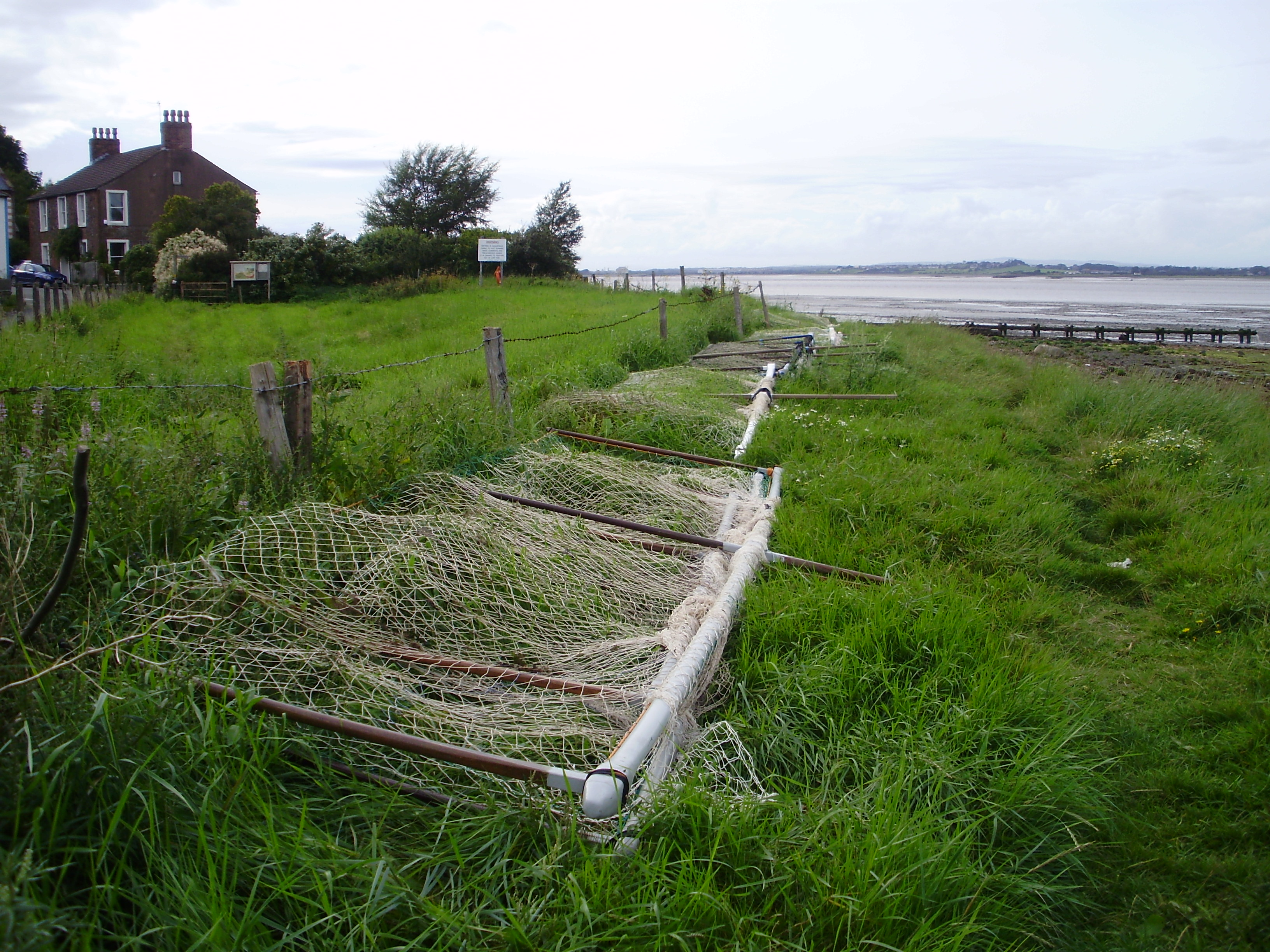 Haaf nets